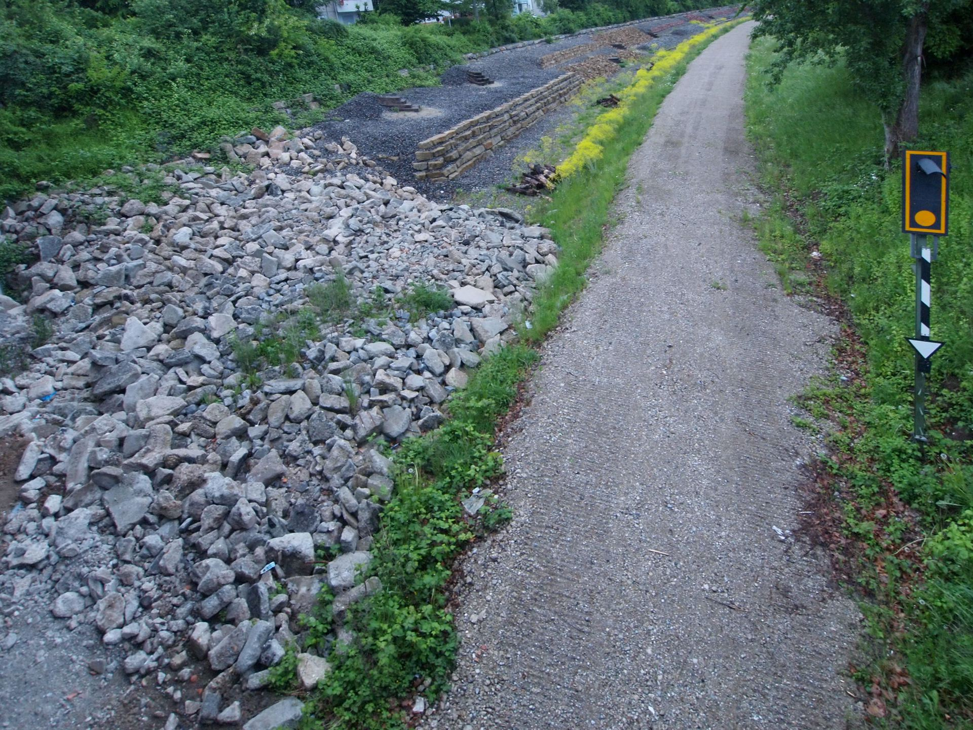 Die Bahnstrecke vom Bahnhof Heilbronn Süd zum Lerchenbergtunnel